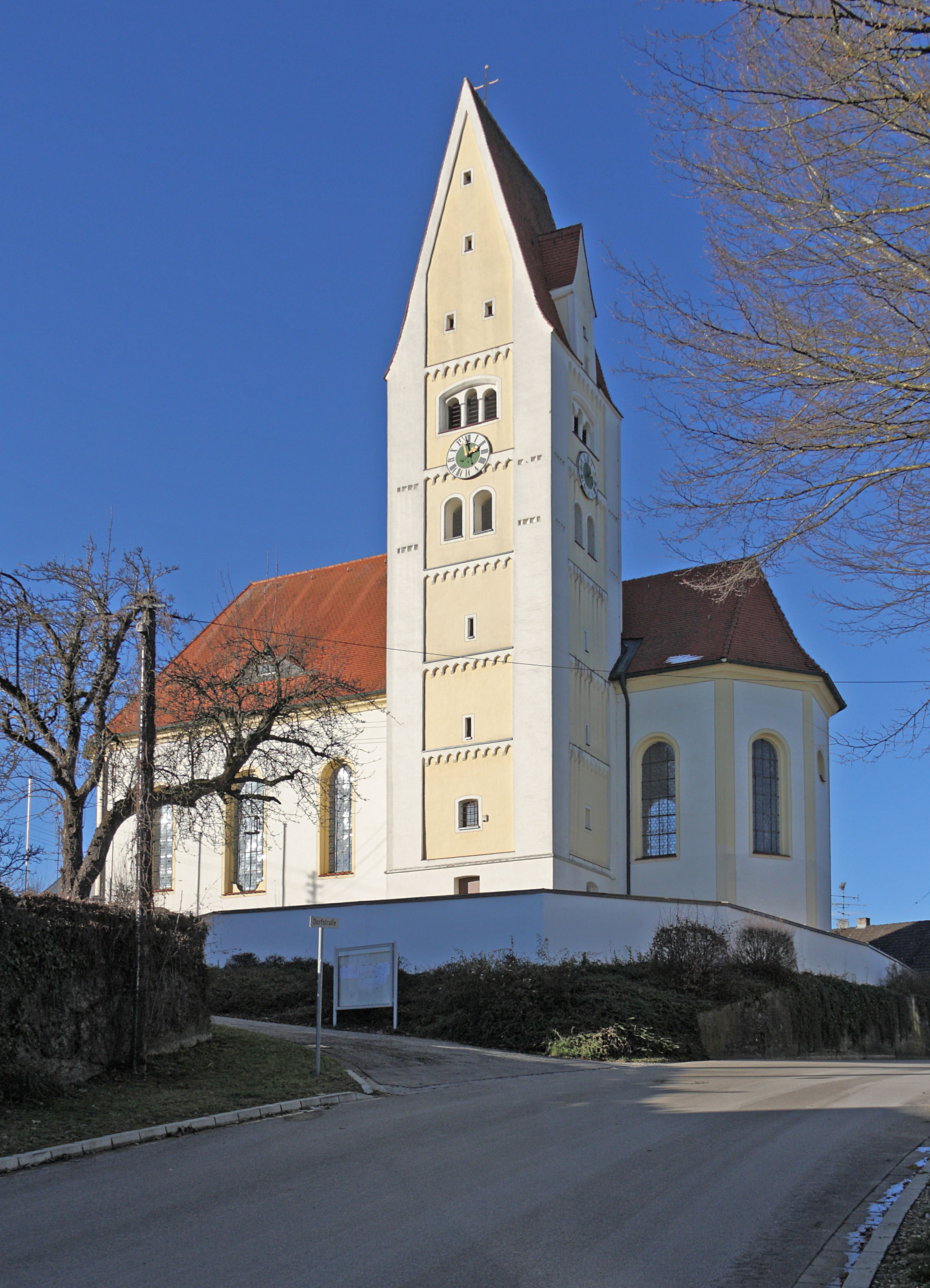 Pfarrkirche Heilig Kreuz in Burg, Gemeinde Thannhausen; Ansicht von Südosten